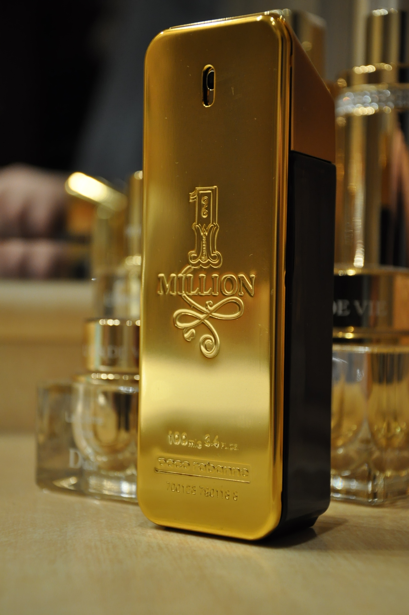 1 Million Paco Rabanne. 100ml